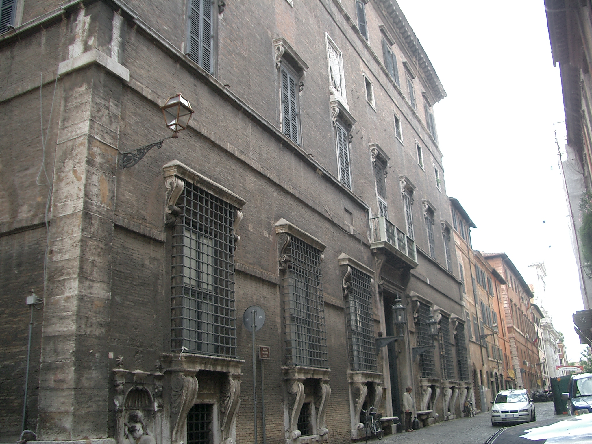 Palazzo Sacchetti in der Via Giulia (ROM), die letzte Adresse Ingeborg Bachmanns in Rom